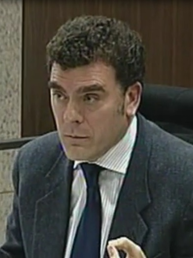 Rafael Gómez Montoya, concejal del Ayuntamiento de Leganés, en un pleno de 2012.